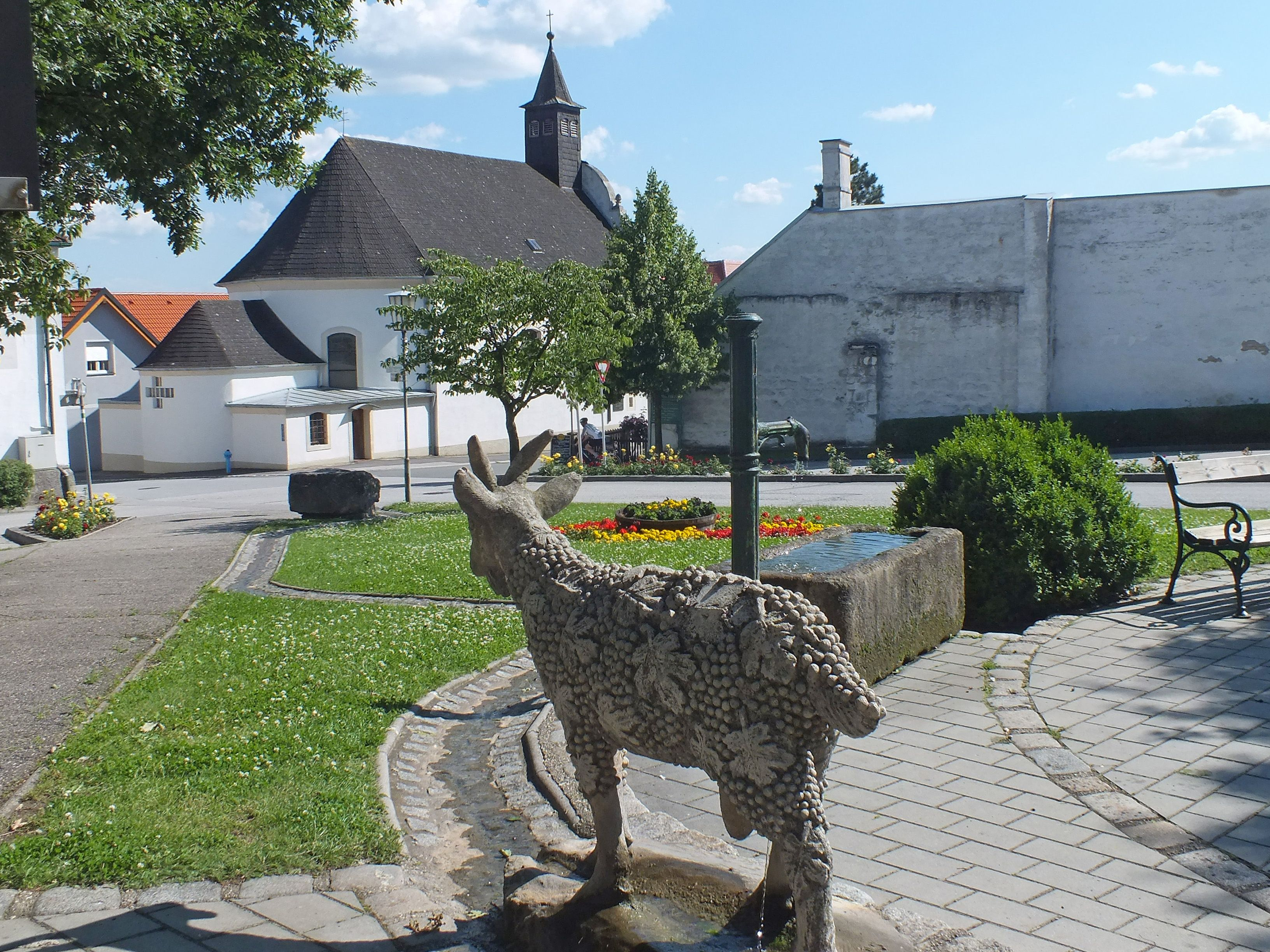 Gemeindeplatz Donnerskirchen mit Filialkirche hl. Johannes Nepomuk. Sogenannte Weinziege, aus deren zwei Eutern Wasser rinnt, als Brunnen.